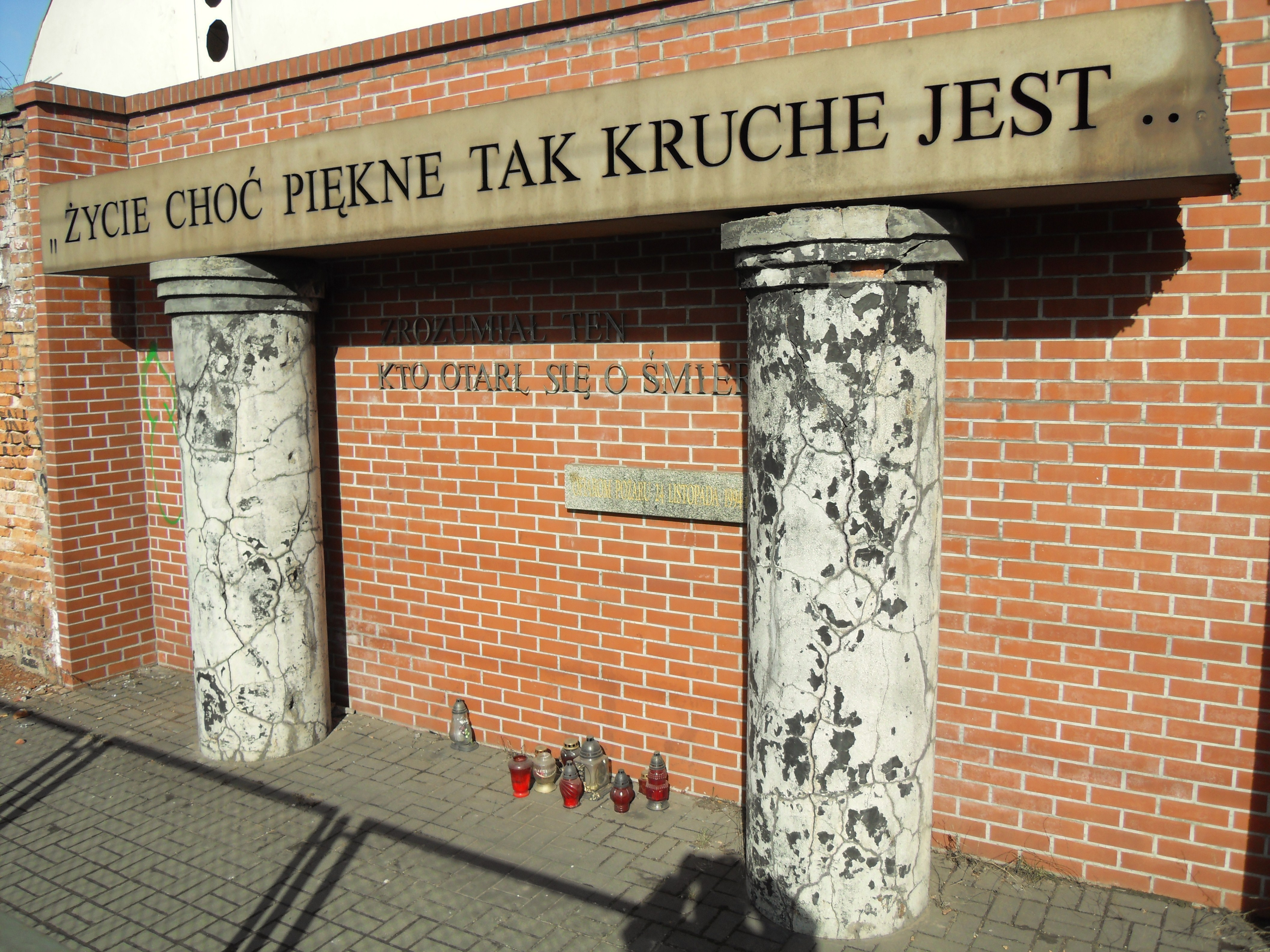 Pomnik "Ofiarom pożaru w hali widowiskowej Stoczni Gdańskiej w dniu 24 listopada 1994 r" przy ul. Jana z Kolna w Gdańsku. Napis "Życie tak piękne choć kruche jest" jest fragmentem piosenki "24.11.94" zespołu Golden Life, poświęconej ofiarom pożaru.